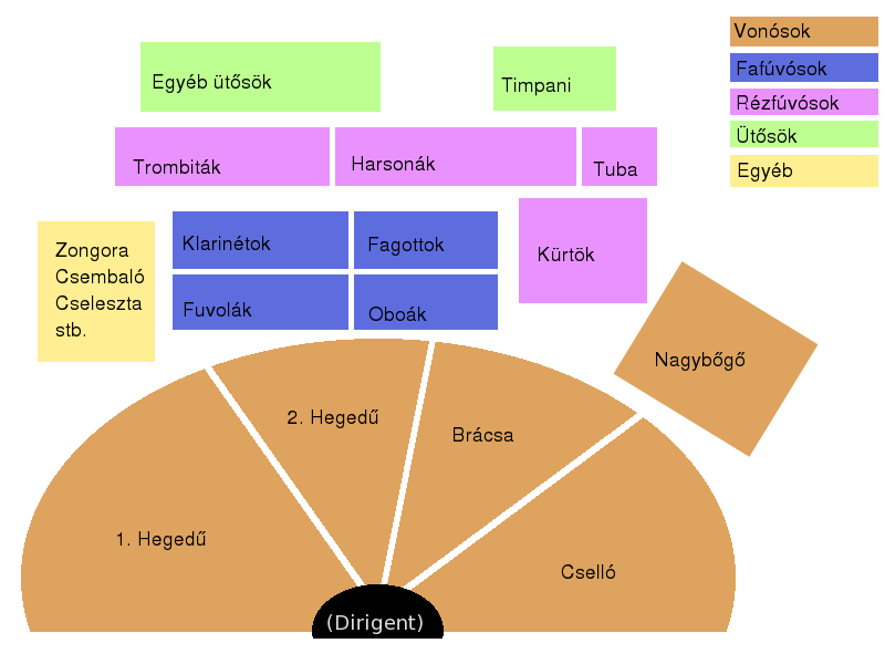 A szimfonikus zenekar ülésrendje